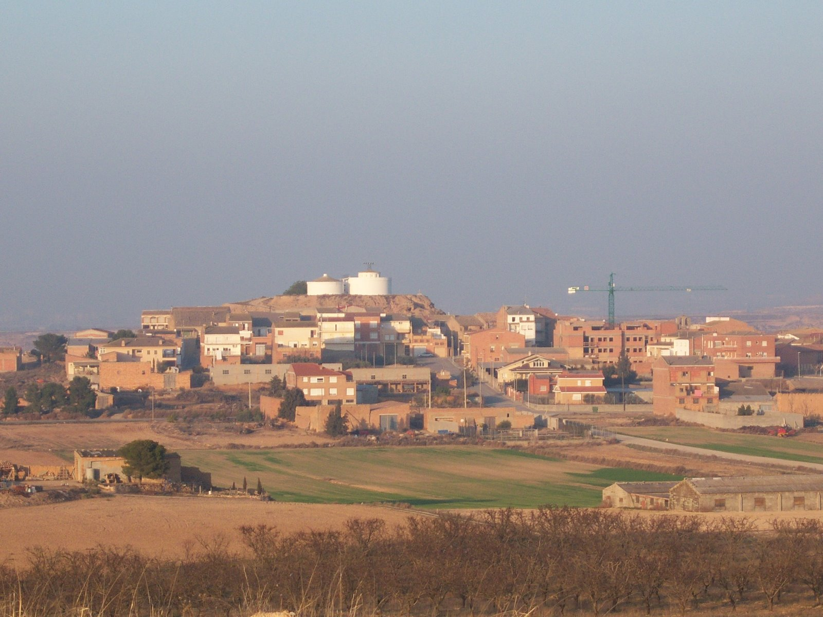 Fotografia de Sunyer